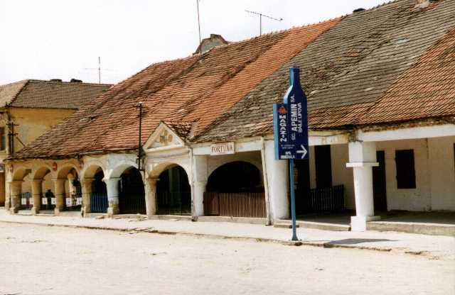 Türkische Bazar, Lippa, Rumänien